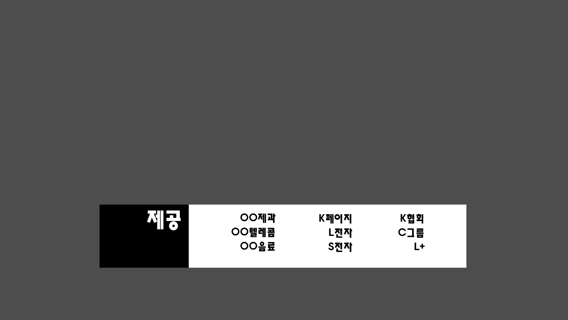 실제 2000년대부터 우리나라 방송된 제공 자막 표시.